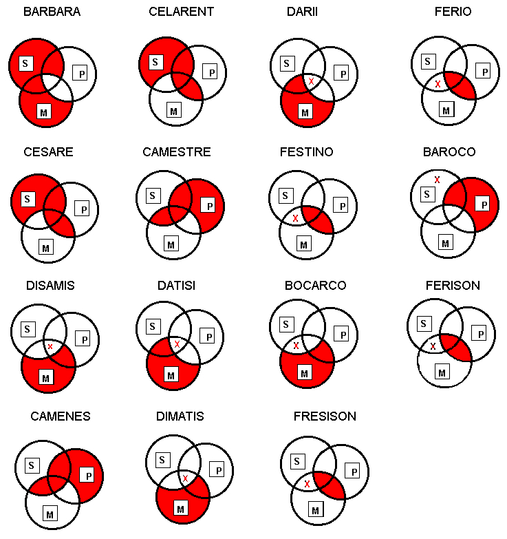 REPRESENTACIÓN GRÁFICA DE LOS MODOS VALIDOS DE SILOGISMO EN DIAGRAMAS DE VENN